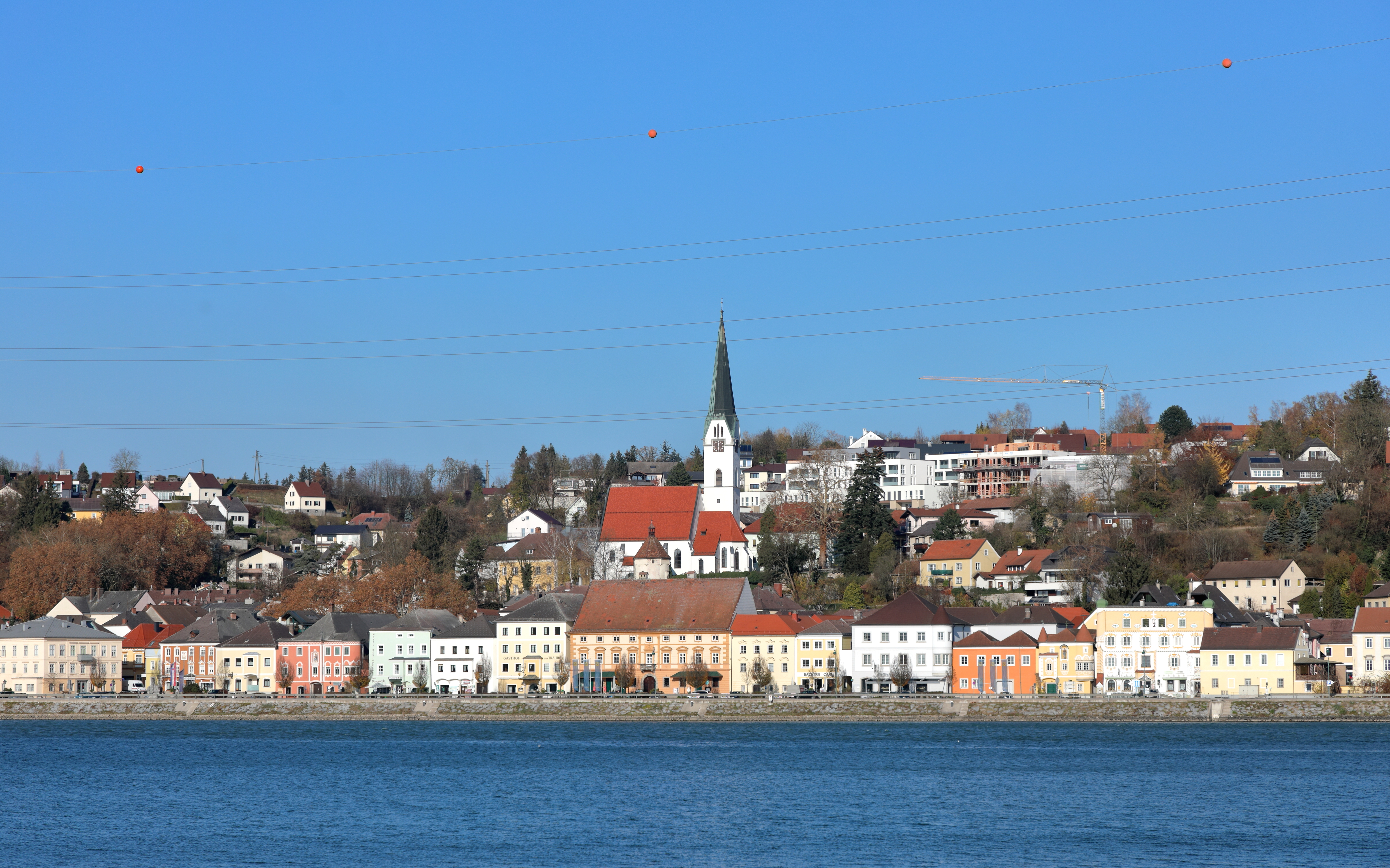 Südansicht des Ortszentrums von Mauthausen, eine oberösterreichische Marktgemeinde an der Mündung der Enns in die Donau.